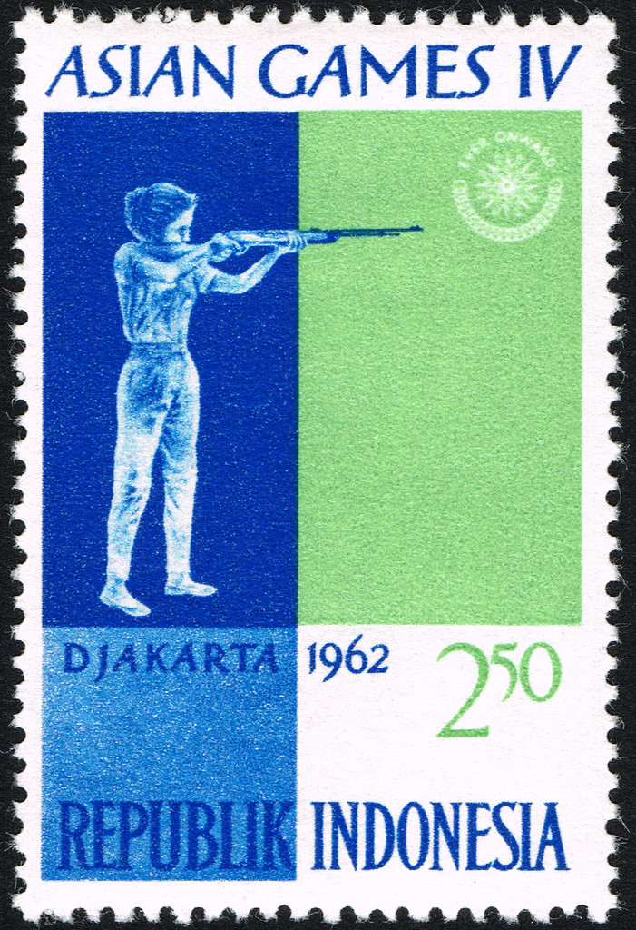 Asian Games IV